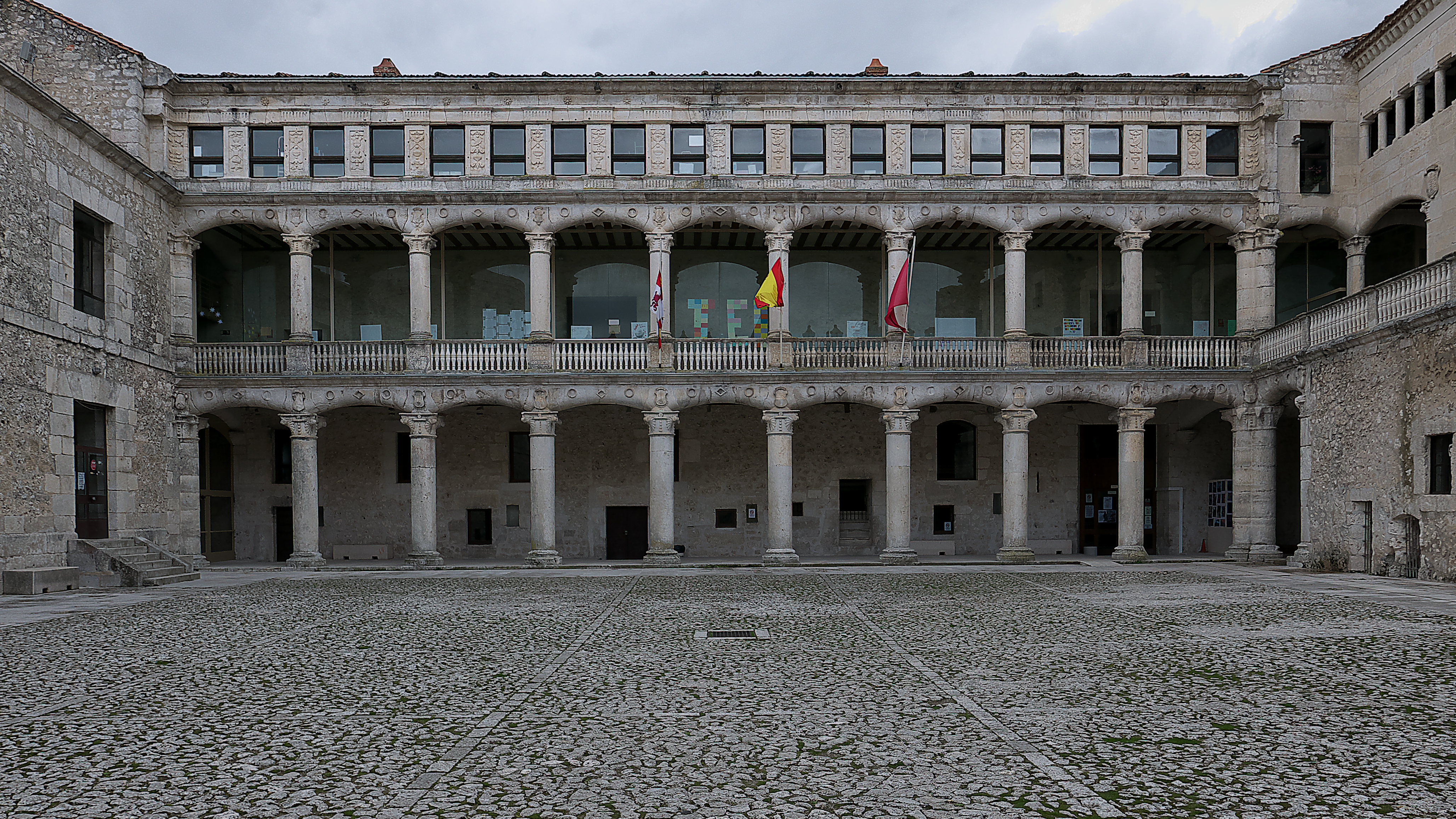 Galería meridional del Patio de Armas del Castillo de los Duques de Alburquerque. Beltrán de la Cueva y Toledo contrata (1552-1557) con Hernán González de Lara una soberbia galería palacial.